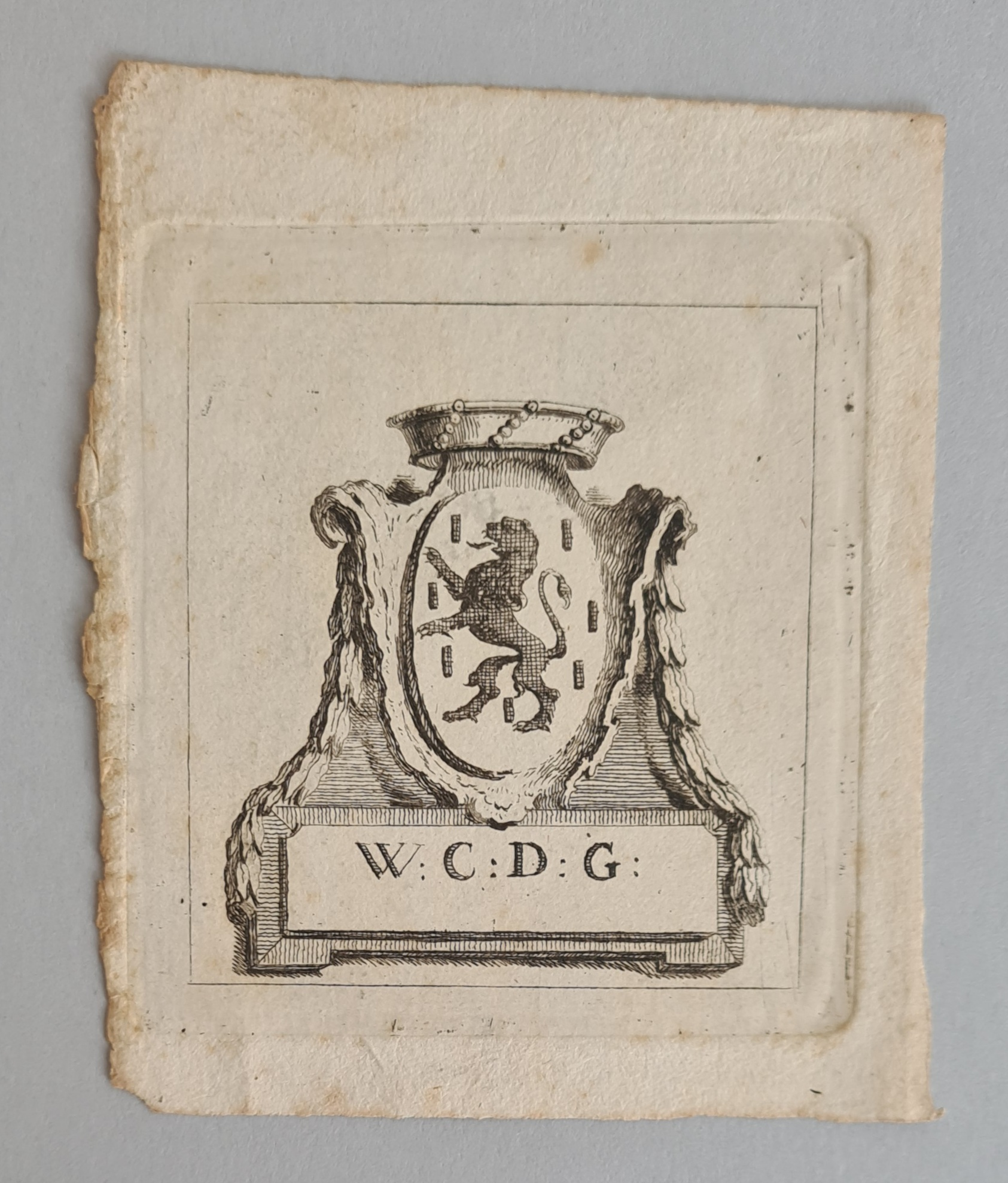 Exlibris Wolfgang Charles de Gingins (1728–1811), Herr zu Chevilly, Welschseckelmeister.